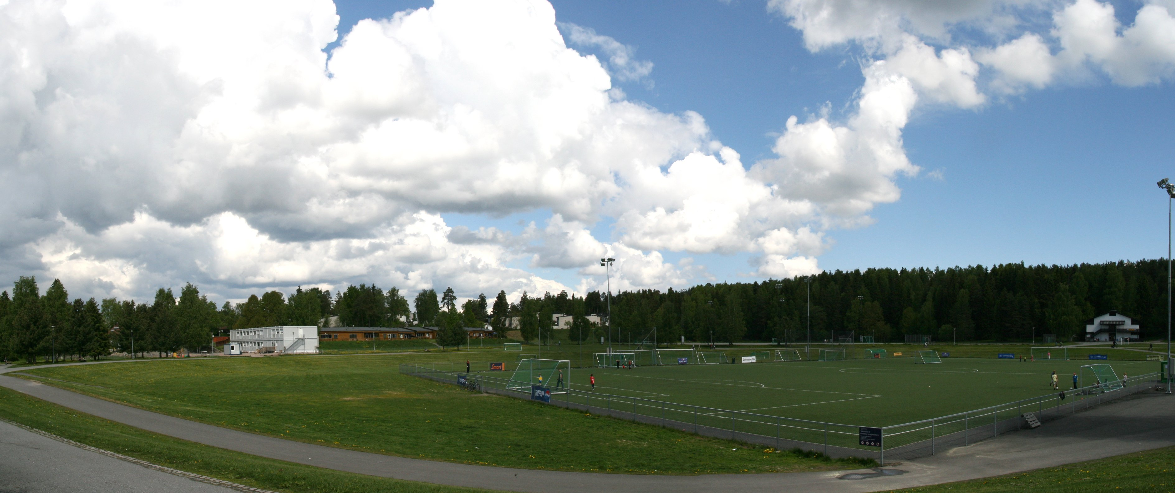 Haraløkka idrettsanlegg, Bøler i Oslo